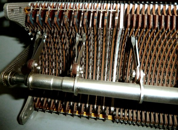 das Bild zeigt einen EMK (Edelmetall-Motor-Koordinatenwähler) mit den Schaltarmen und den Bankkontakten